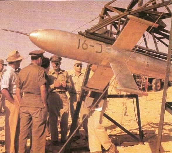 Luz missile, 1956 with Chief of staff of the Israel Defense Forces, Moshe Dayan